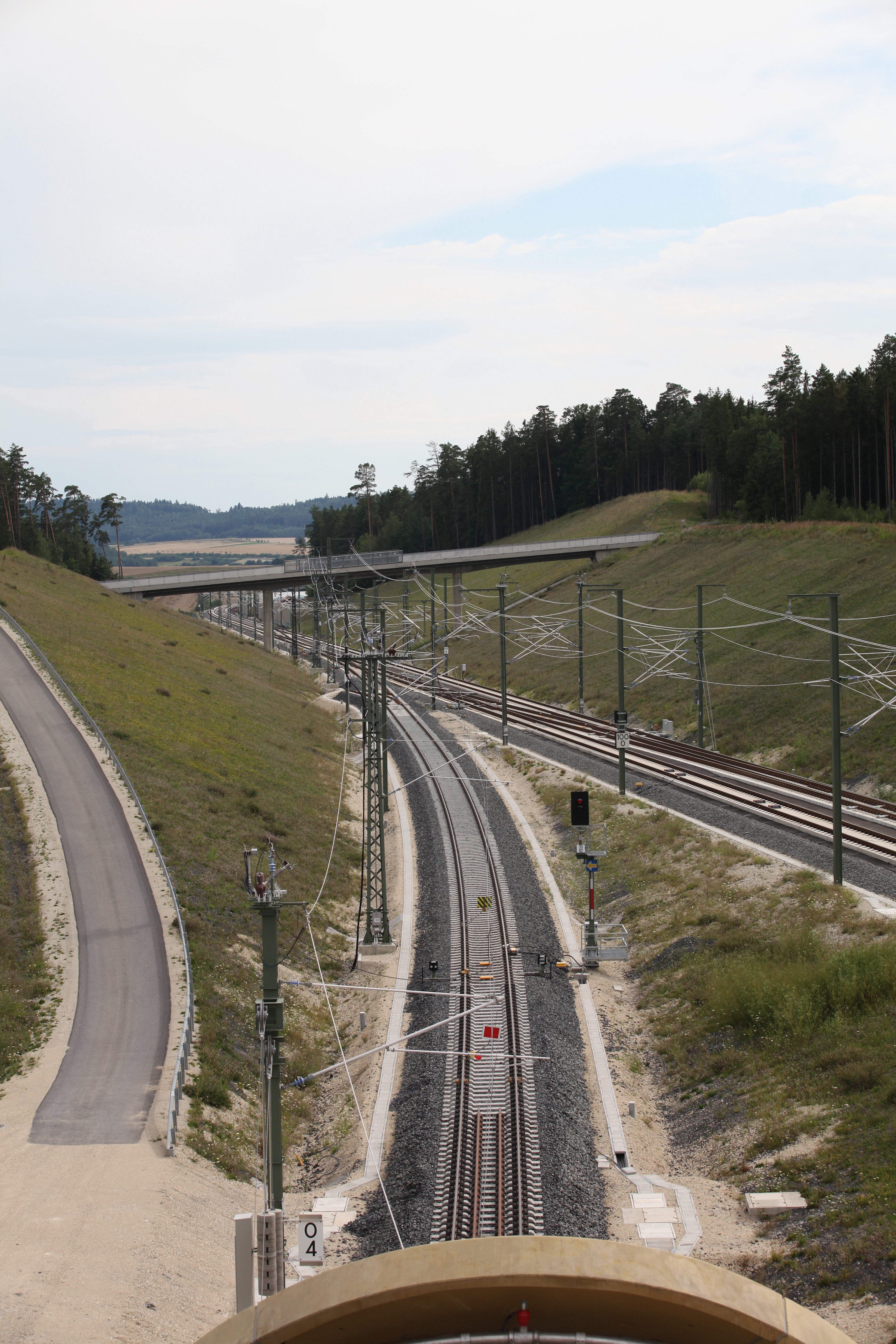 Verbindungskurve Niederfüllbach, Südseite